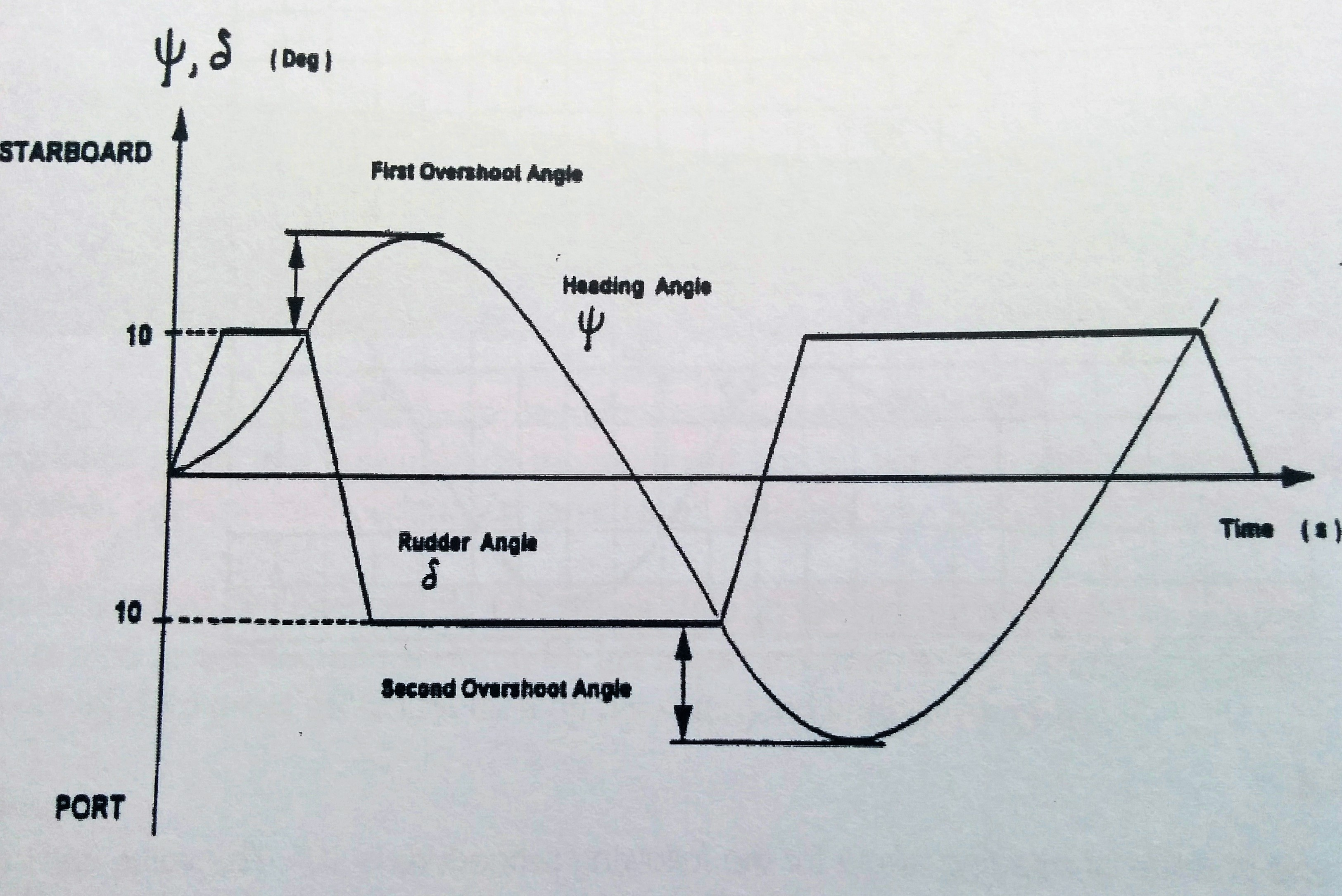 Illustratie ter verduidelijking van de overshoot angle na inzetten van de zig-zagproef.